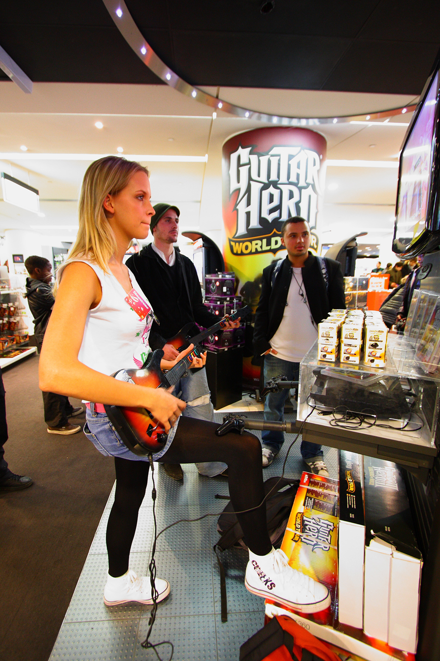 Fanny jouant au jeu vidéo Guitar Hero dans un magasin Fnac de Paris.